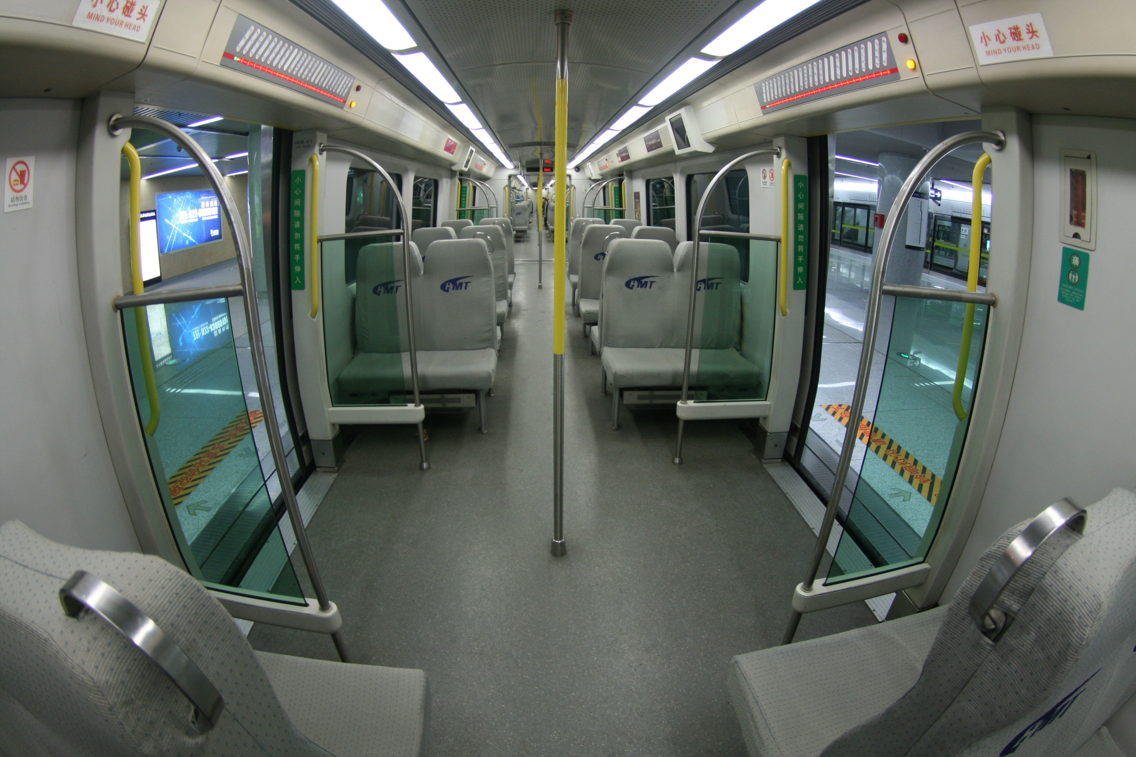 天津地鐵九号线列車在天津站同時開啟2側車門.....0001....此圖為廣角攝影，可能與現實有出入!